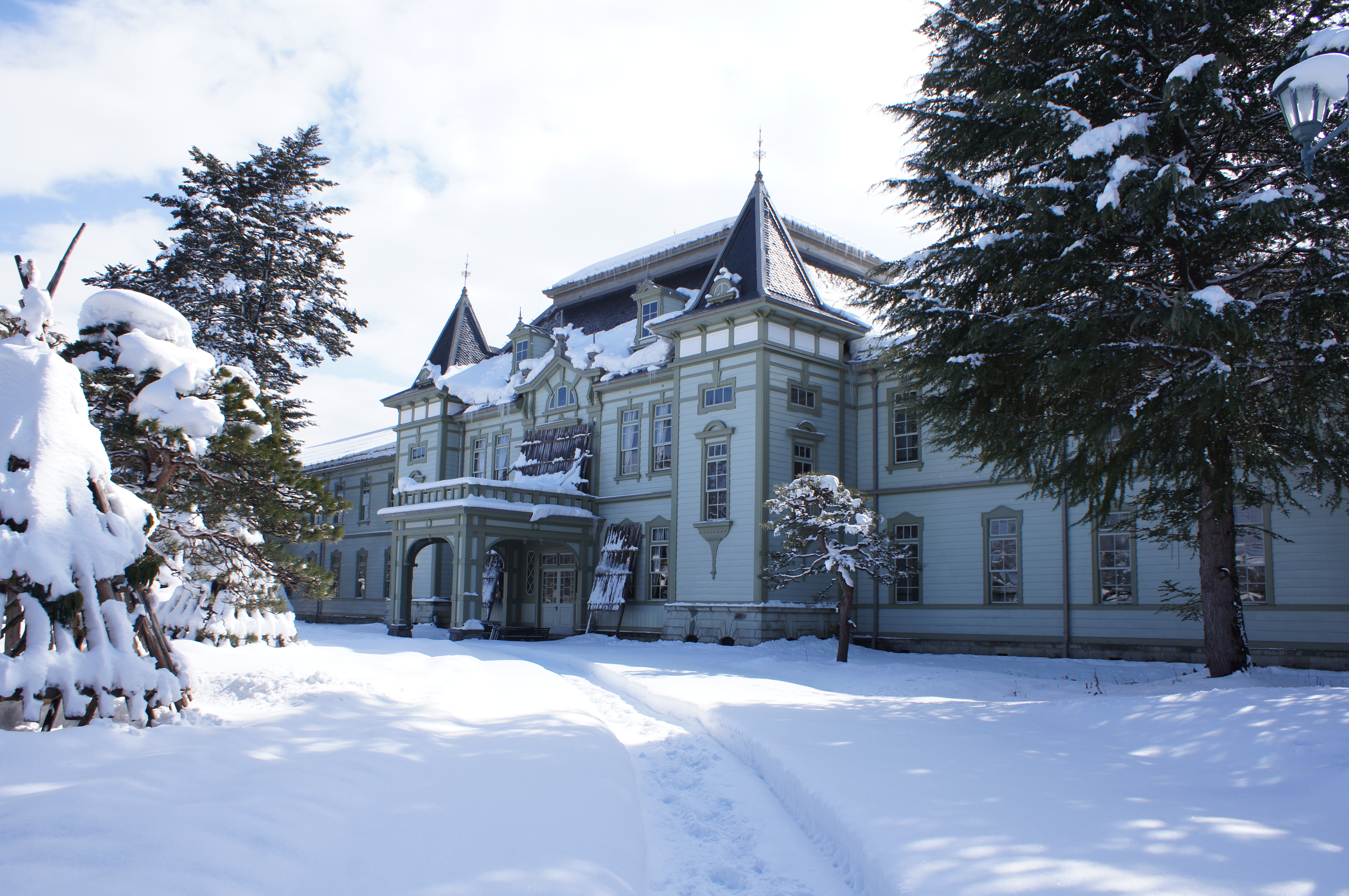 旧米沢高等工業学校本館（山形大学米沢キャンパス内、国指定重要文化財）